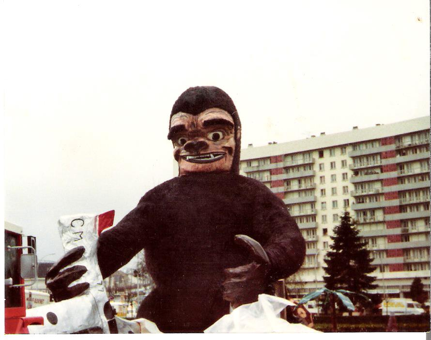 Photo personnelle d'un char de mi-carême